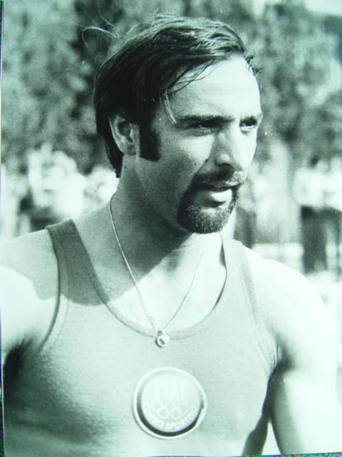 Il saltatore con l'asta Italiano Renato Dionisi durante una gara.